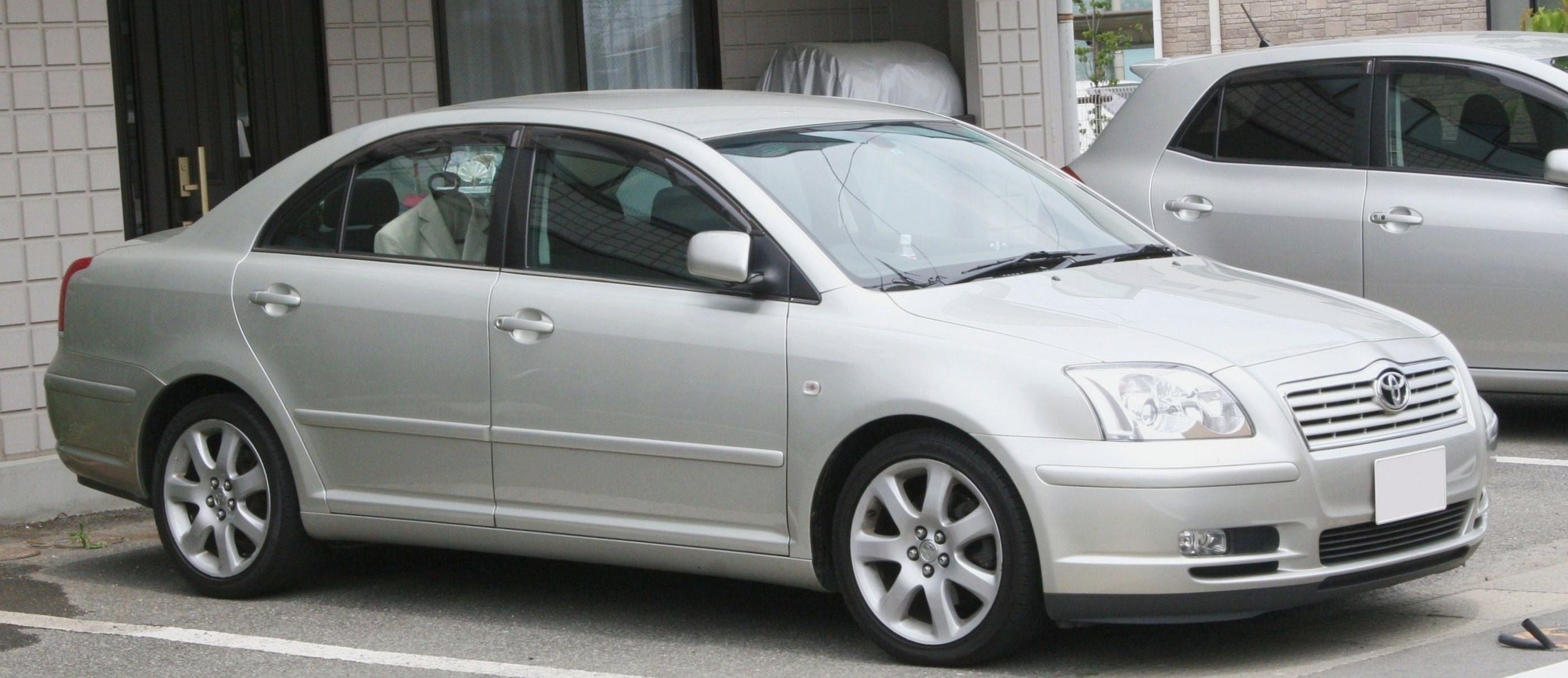 Toyota Avensis